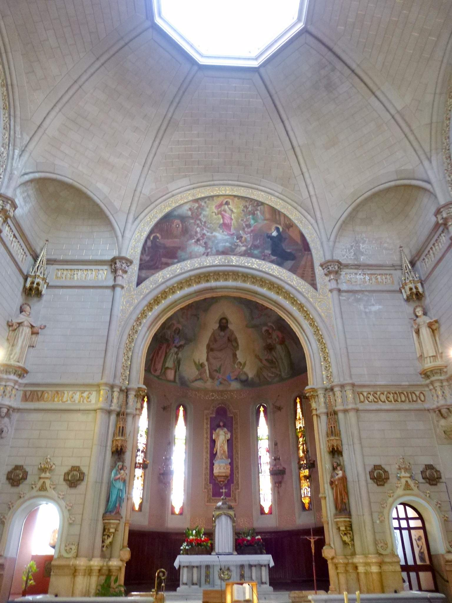 Templo de la Reparación (Tortosa, Tarragona)